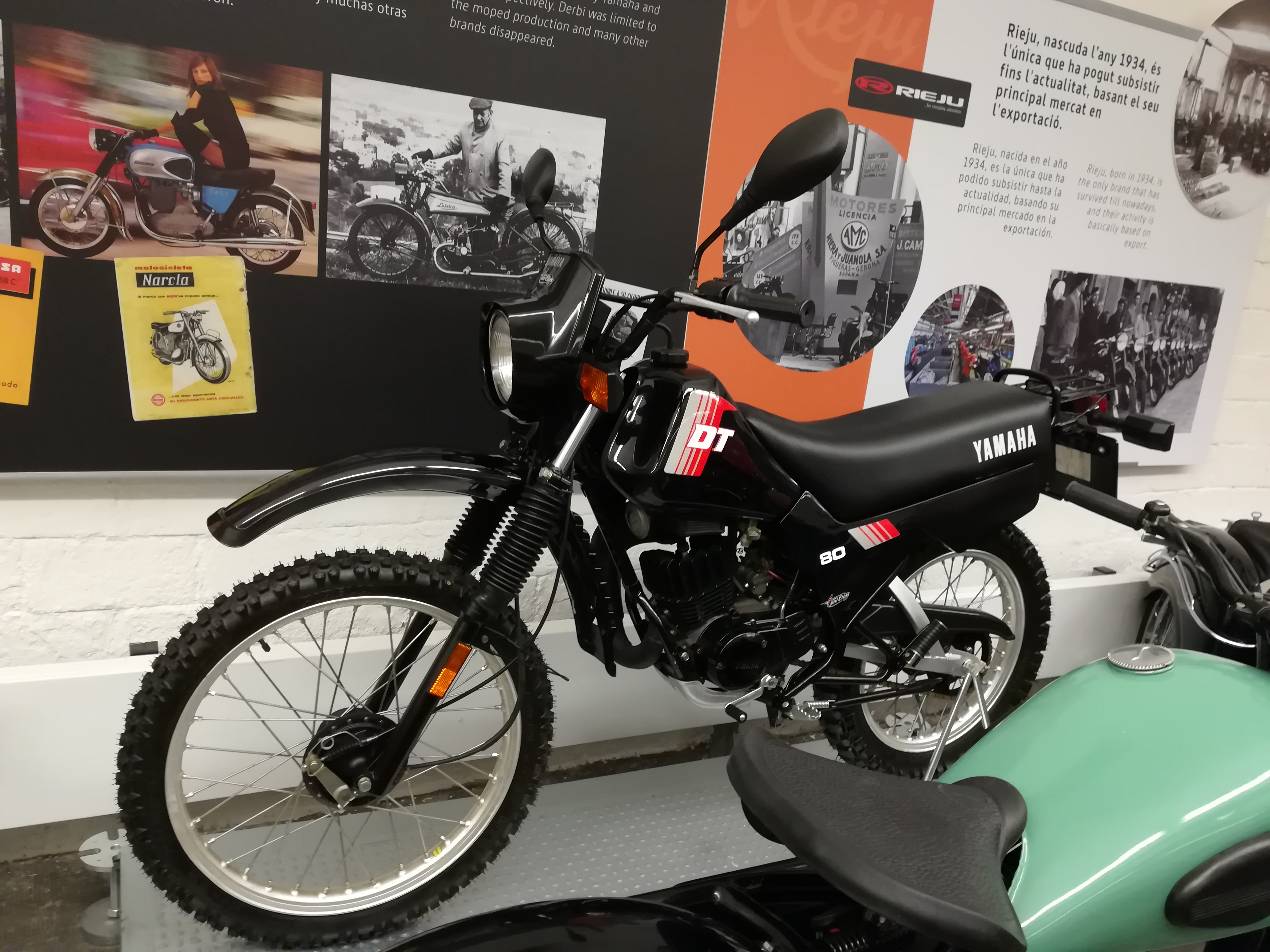 Yamaha DT 80, 73 cc (1982)